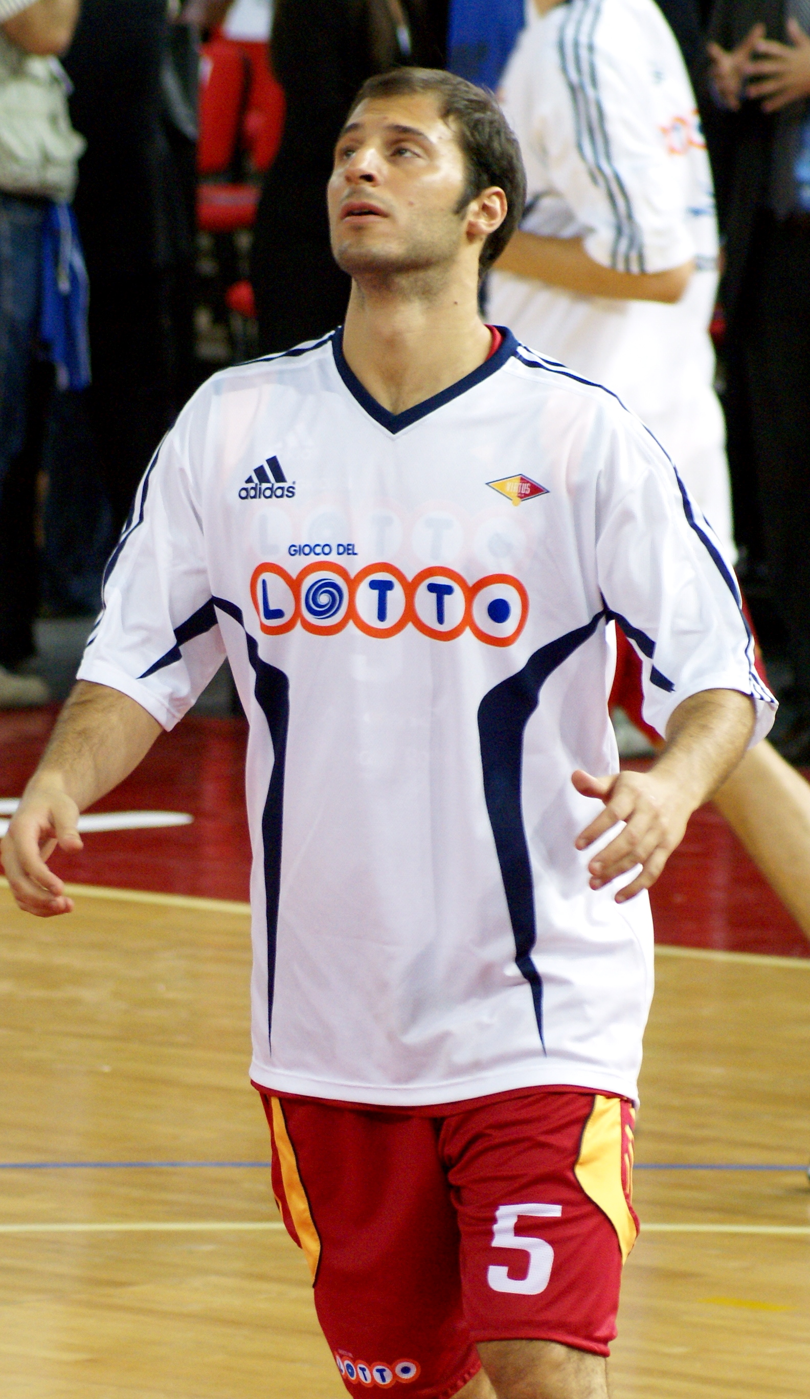 Jacopo Giachetti